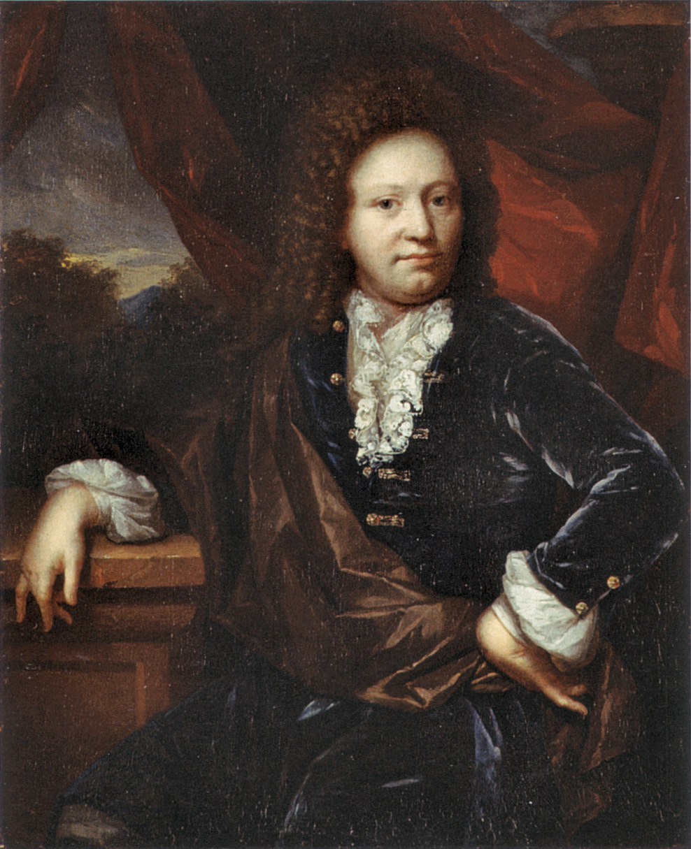 Johann Adolf von Plettenberg-Lenhausen (1655-1695)